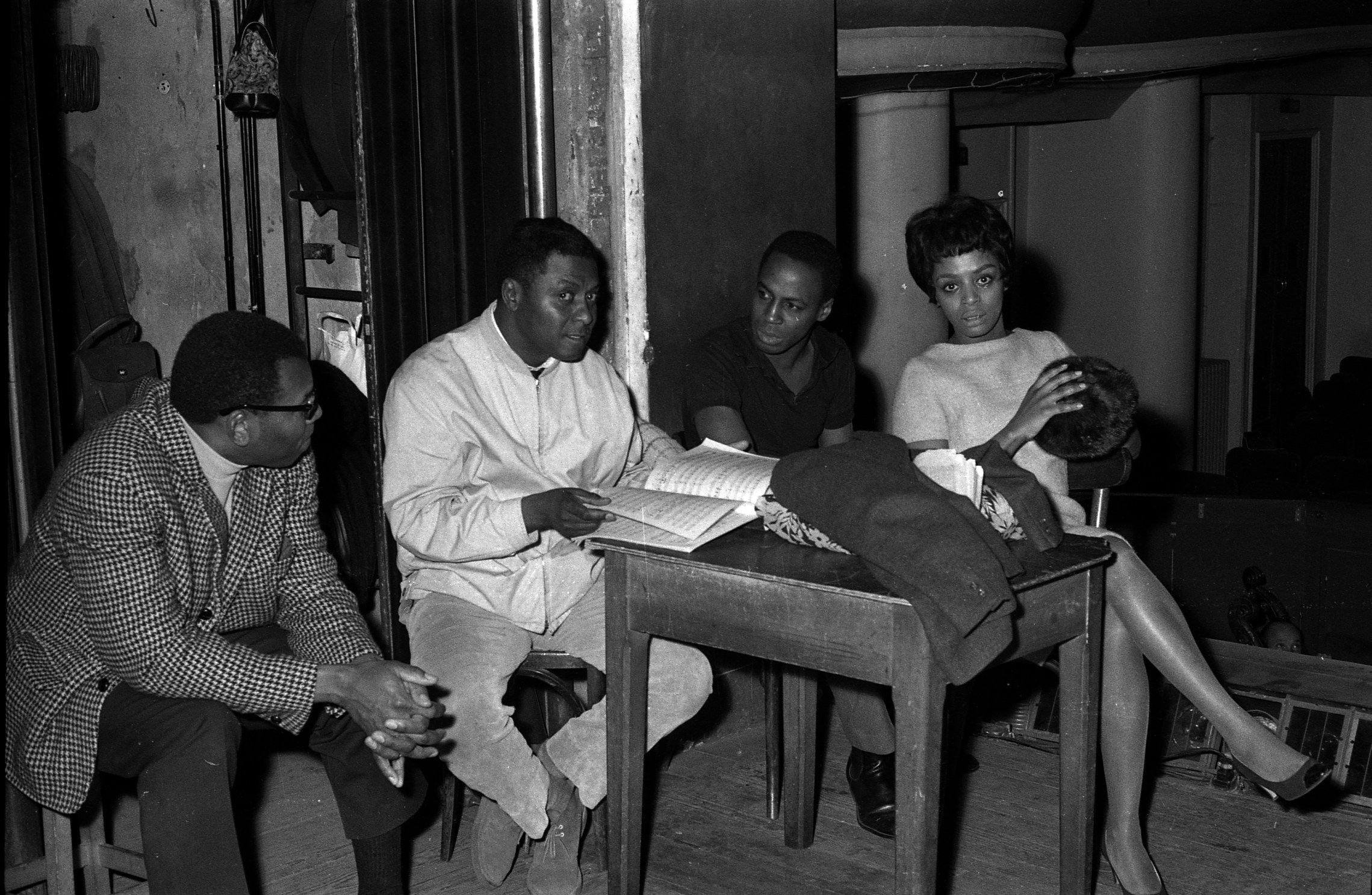 intérieur du théâtre du Capitole. Le 23 février 1967. Plan rapproché sur scène, vue des coulisses, avec de gauche à droite les chanteurs George Goodman, WilliamRay, Robert Guillaume et la chanteuse Olive Moorefield, lors de la répétition de l'opéra "Porgy and Bess". Observation: Répétion, au Théâtre du Capitole de l'opéra américain "Porgy and Bess", Musique de geoge Gershwin, à l'occasion du 30ème anniversaire de sa mort.